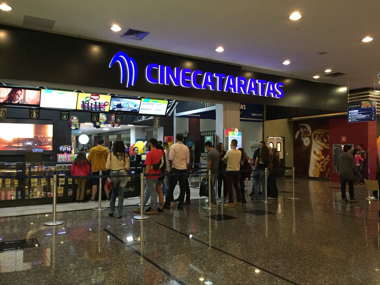 Foyer do Cine Cataratas de Foz do Iguaçu, PR